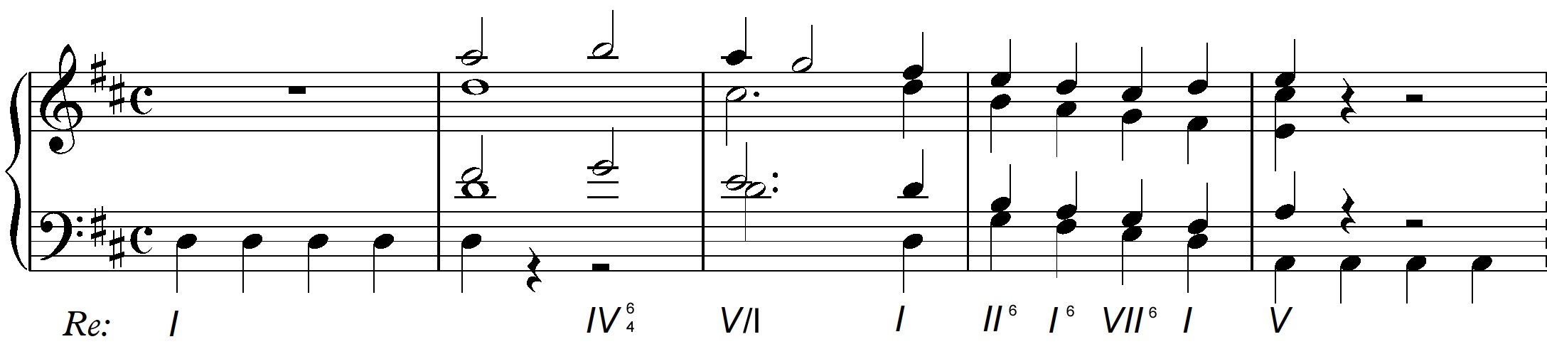 Analisis con Cifrado Romano